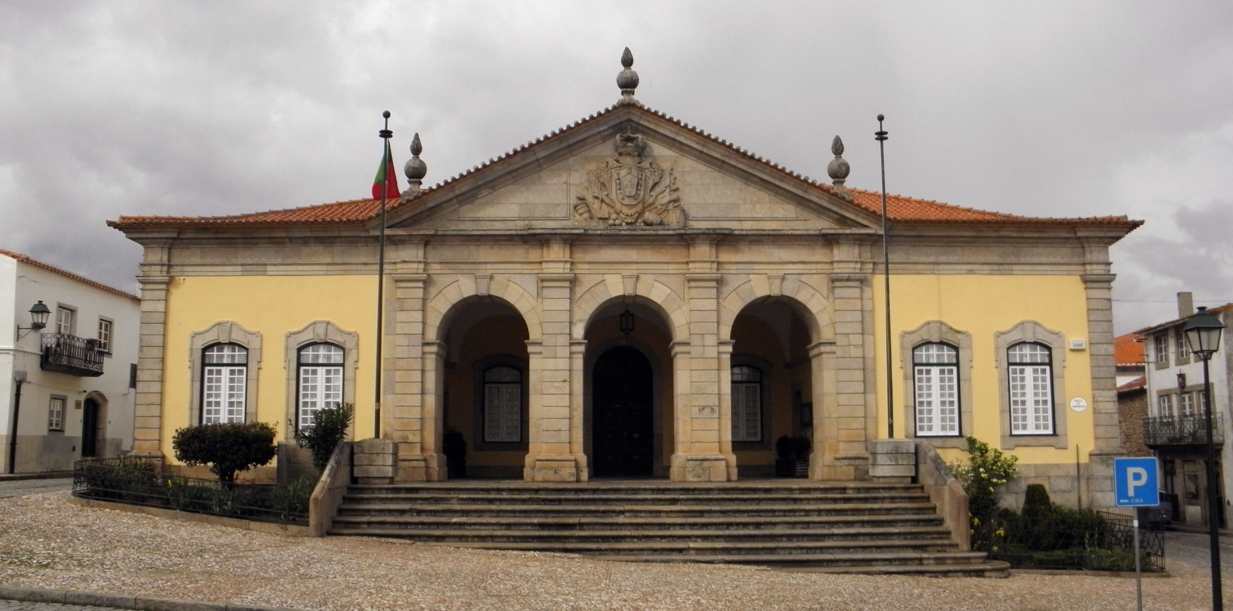 Almeida Town Hall / Câmara Municipal de Almeida